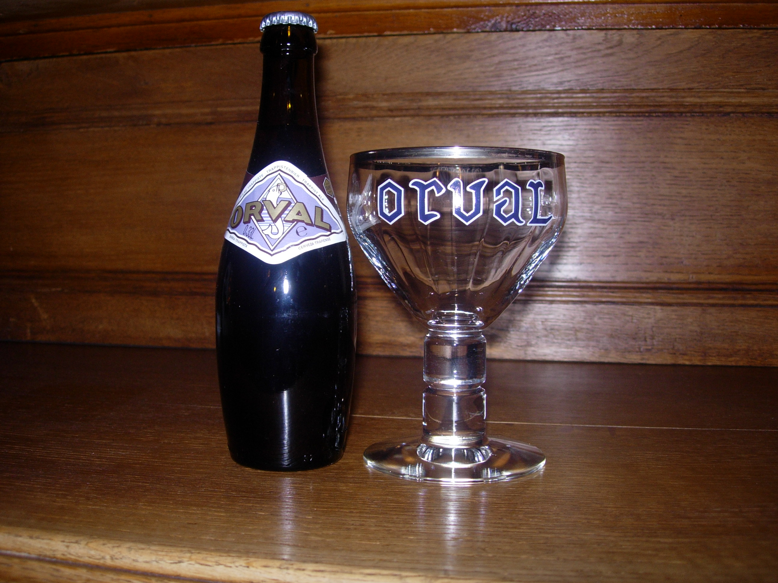 Bière d'Orval et son verre.